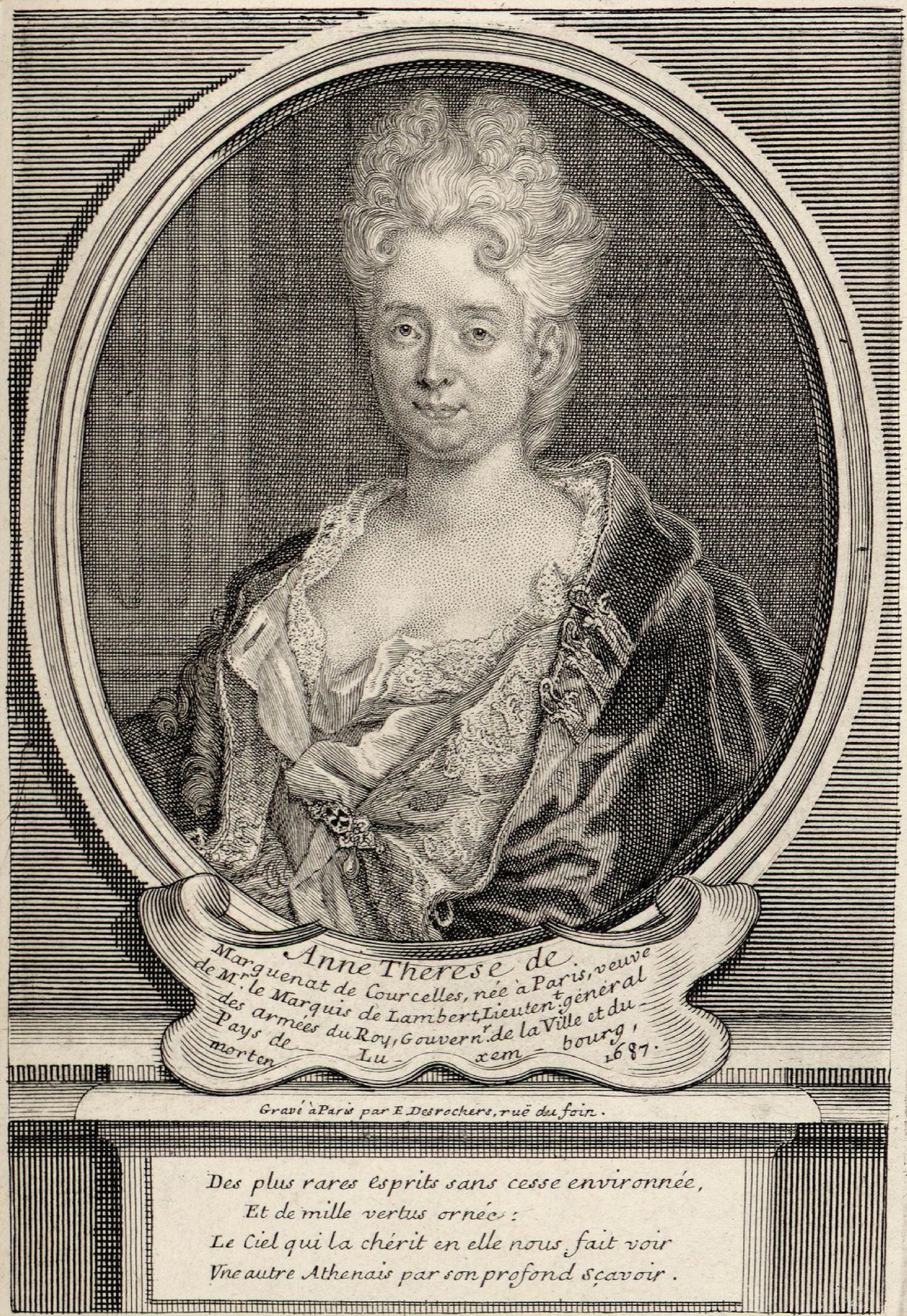 Stich mit dem Porträt der französischen Schriftstellerin Anne-Thérèse de Marguenat de Courcelles